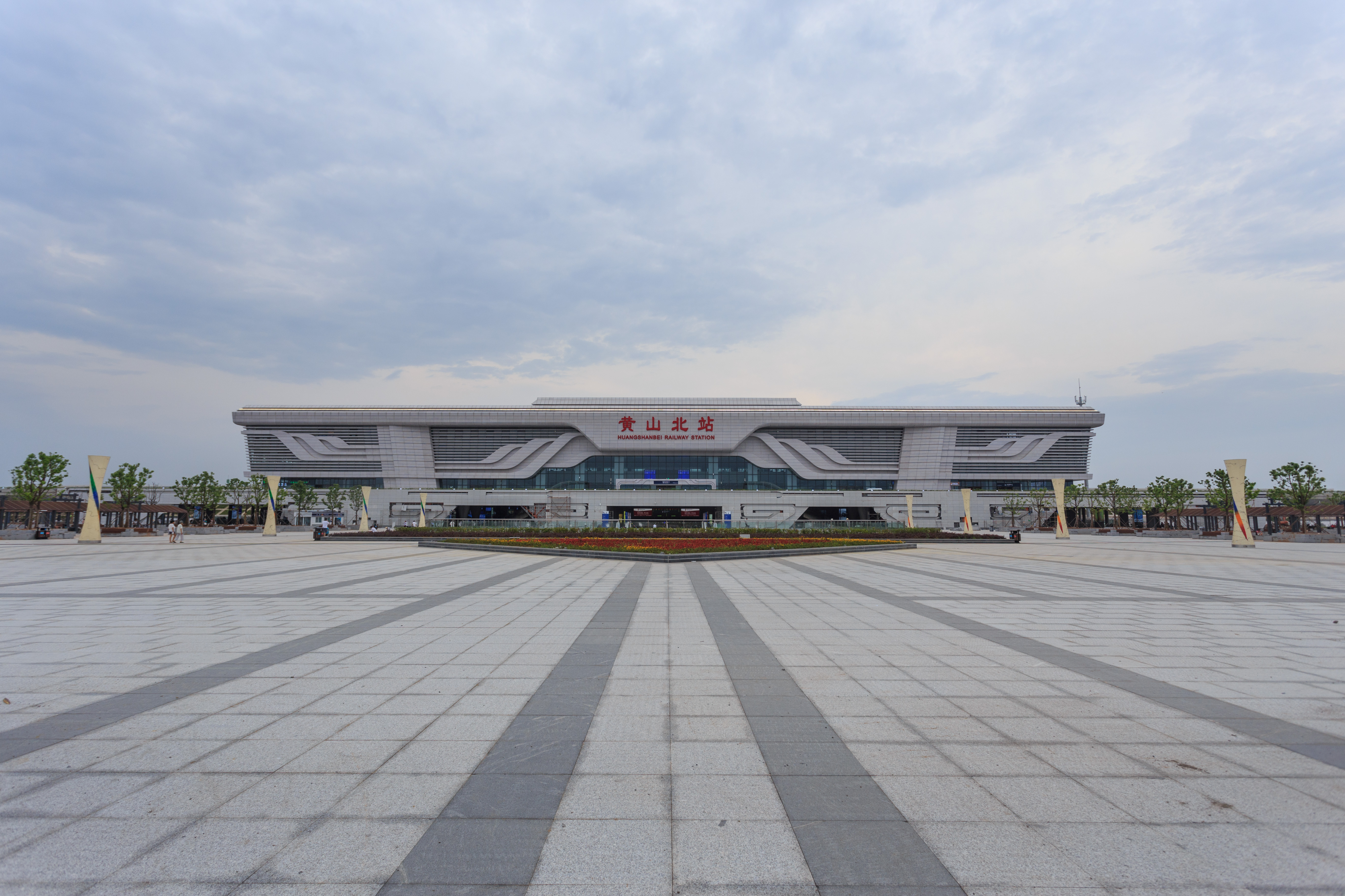 黄山北站